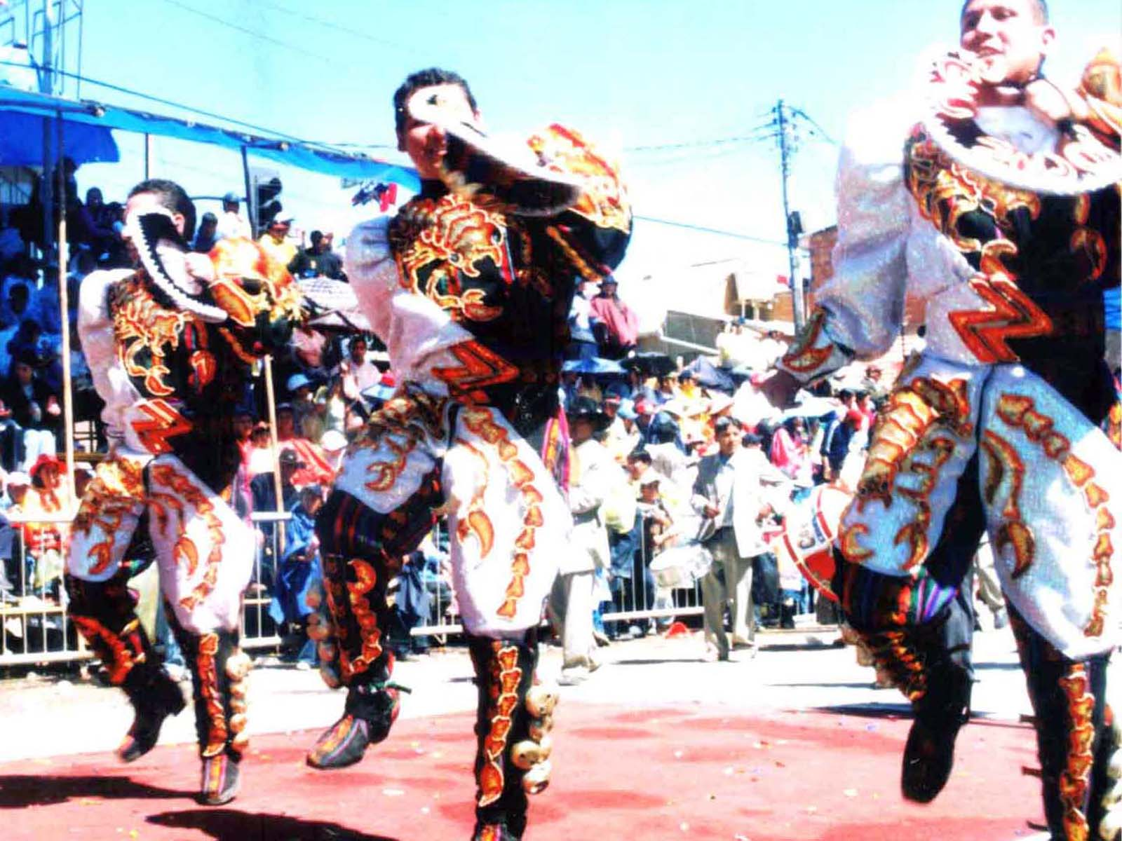 Het Carnaval van Oruro, Bolivia, het staat sinds 2001 vermeld op de Lijst van Meesterwerken van het Orale en Immateriële Erfgoed van de Mensheid van UNESCO.